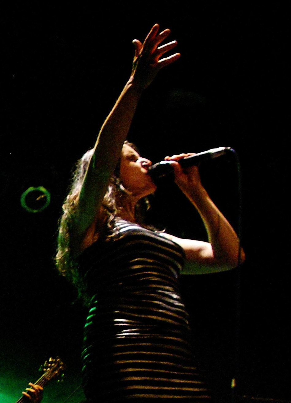 Fulano en el 7° Festival Internacional de Jazz de Puerto Montt